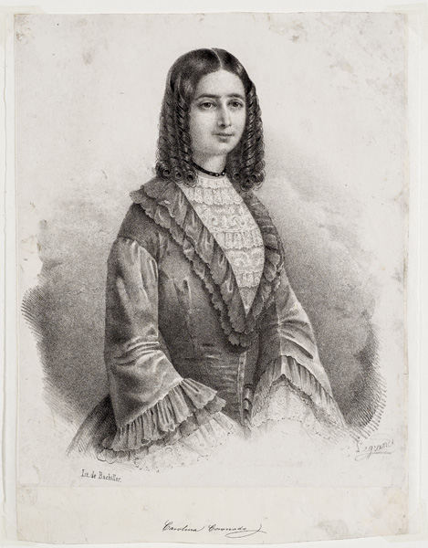 Estampa. Carolina Coronado.